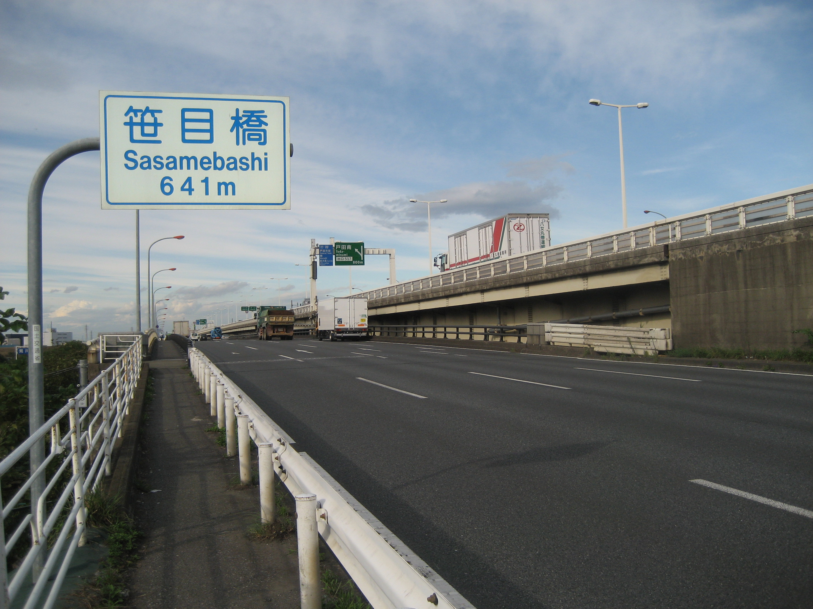 笹目橋（地点名標識を含めて板橋区側から撮影）